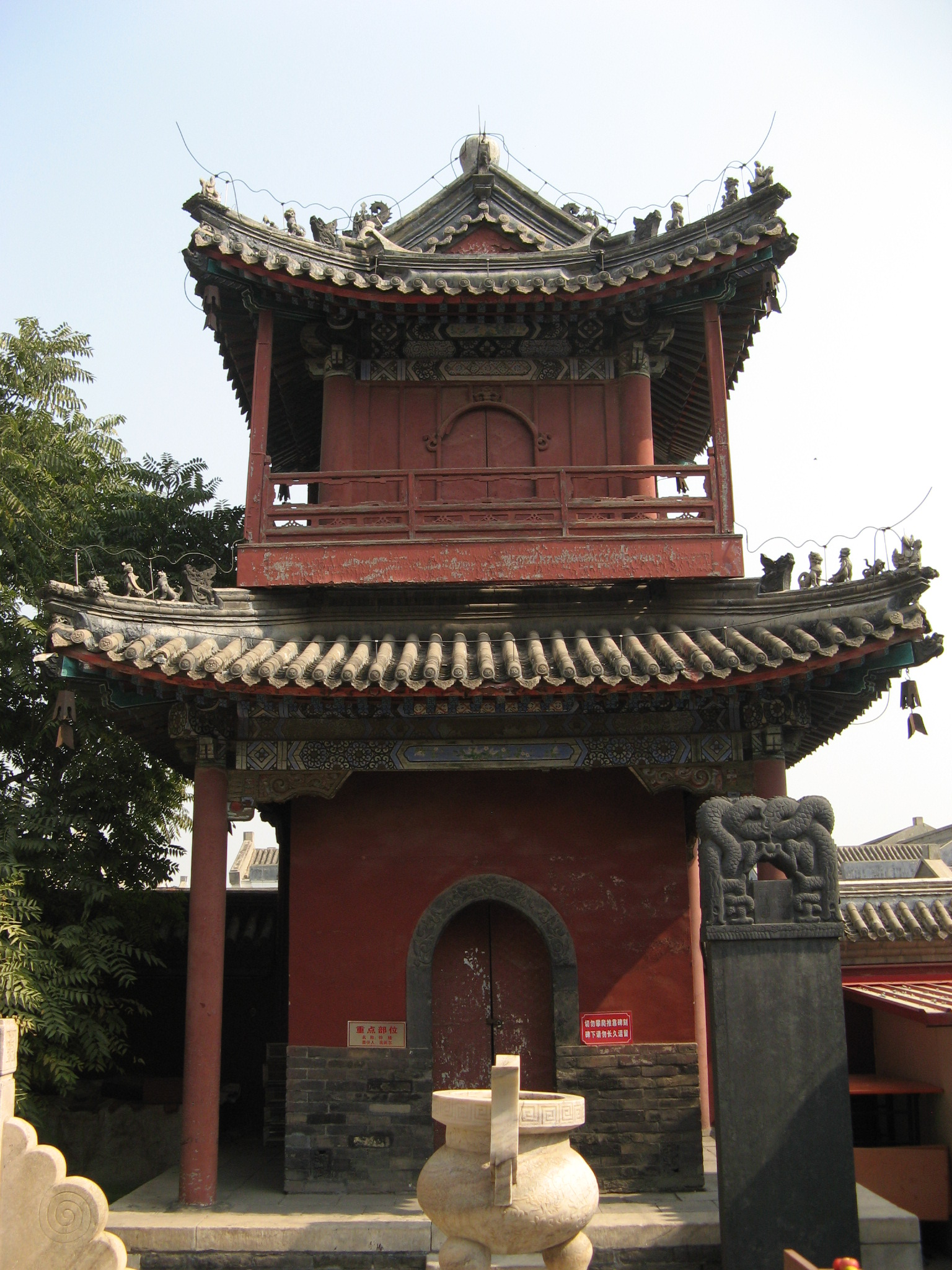 中国河北省保定市大慈阁，全国重点文物保护单位。图为东面的钟楼。